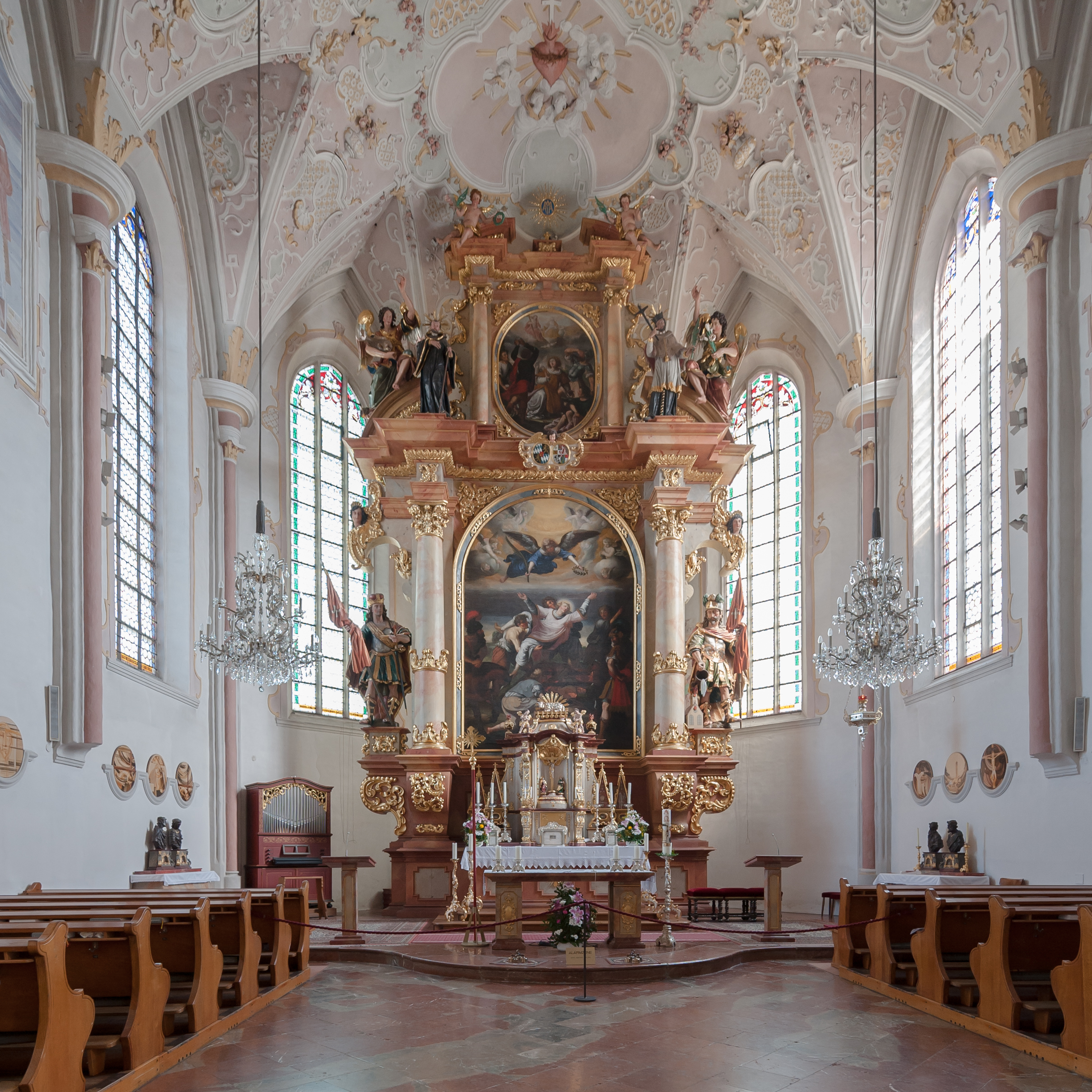 Altheim: Kath. Pfarrkirche hl. Laurenz und Friedhof